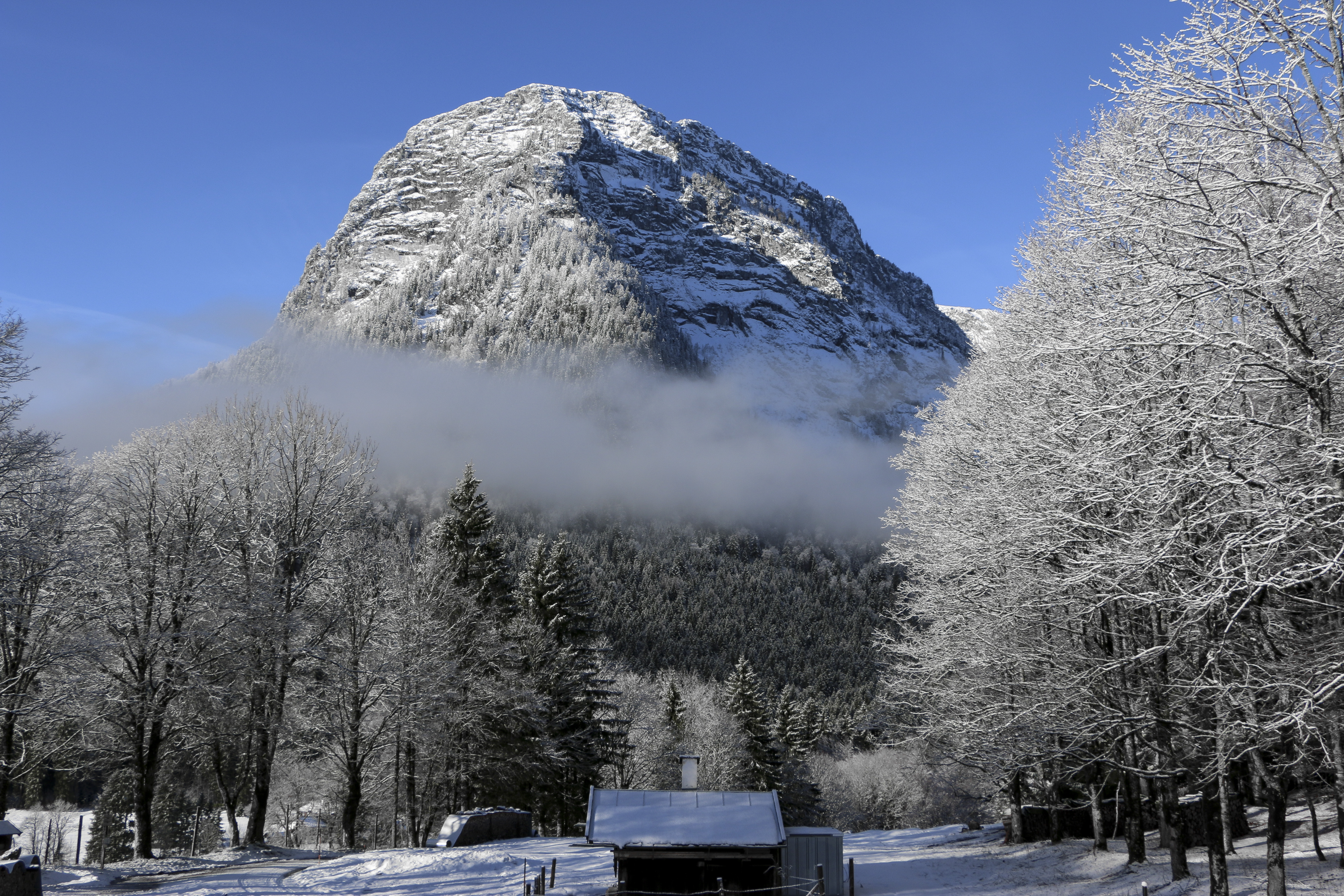 Nationalpark Berchtesgaden: Das Bild zeigt die Eisberg Ostseite und ist ein Teil der Reiteralm. Aufgenommen etwas oberhalb des Taubensees (Ramsau b. Berchtesgaden) auf dem Weg zur Mordaualm